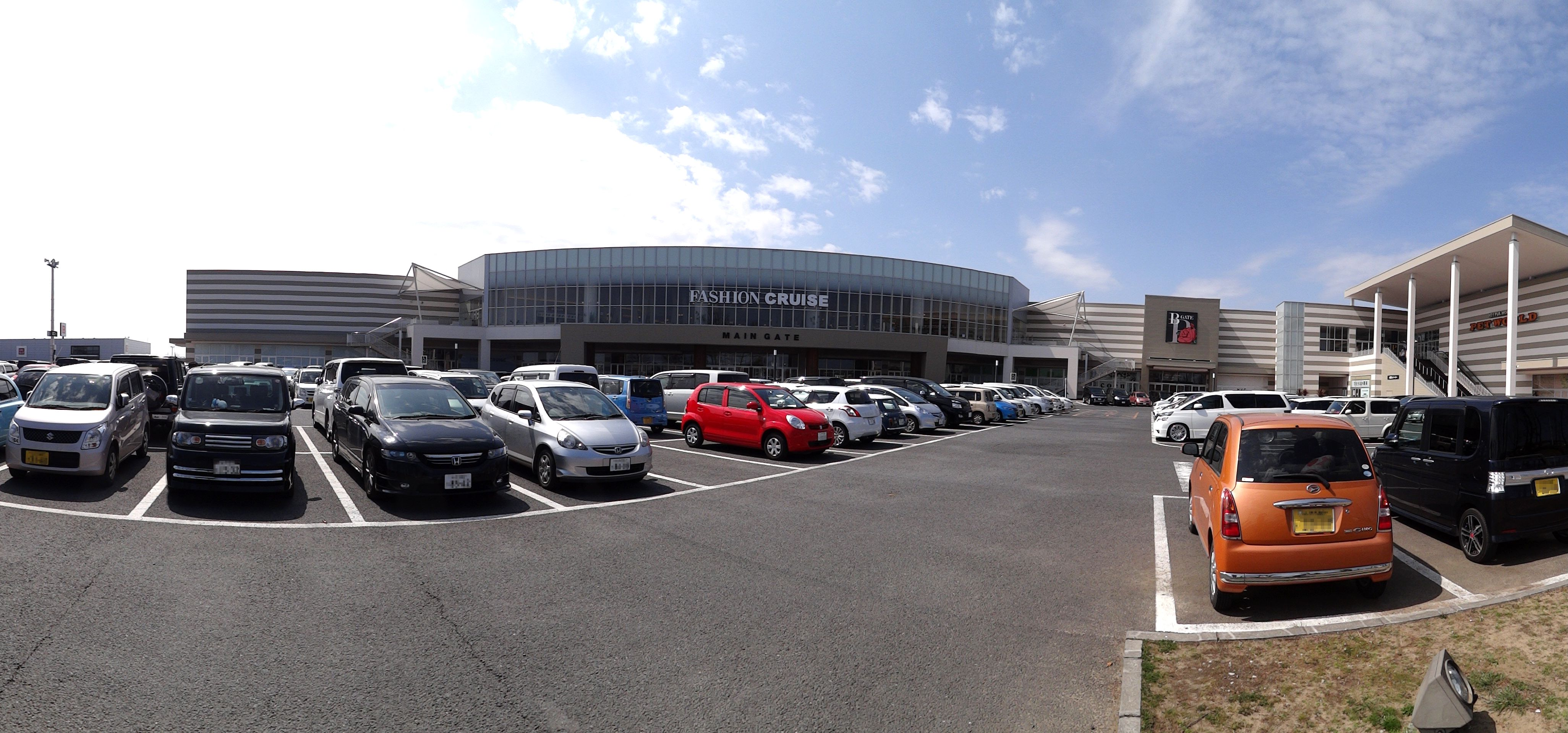 ファッションクルーズニューポートひたちなか